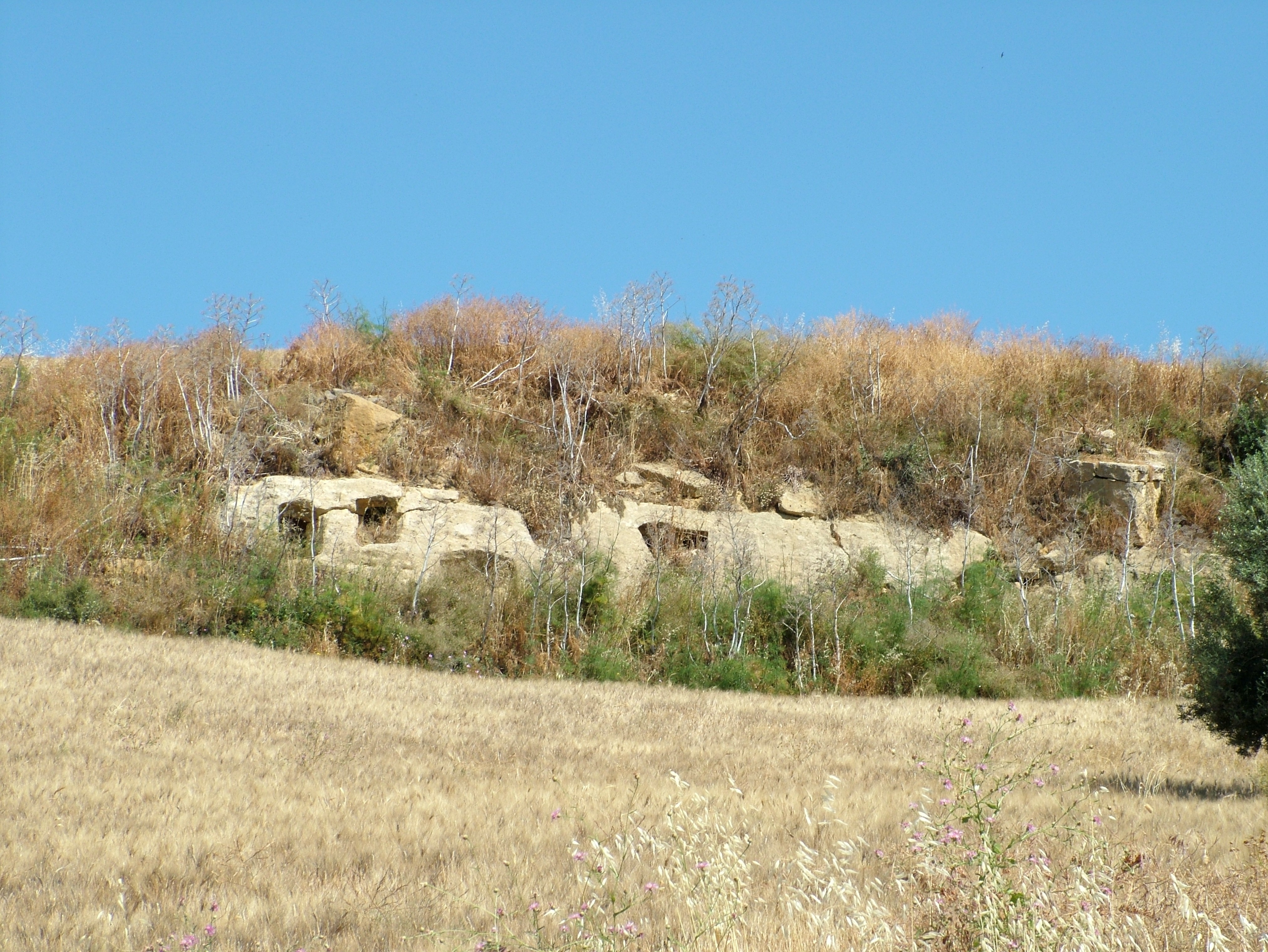 Caltanissetta, Sizilien, Archäologisches Gebiet von Sabucina, Gräber